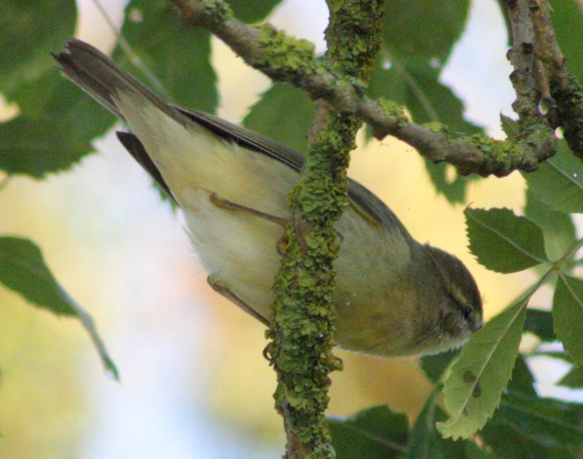 Phylloscopus trochilus pouillot fitis